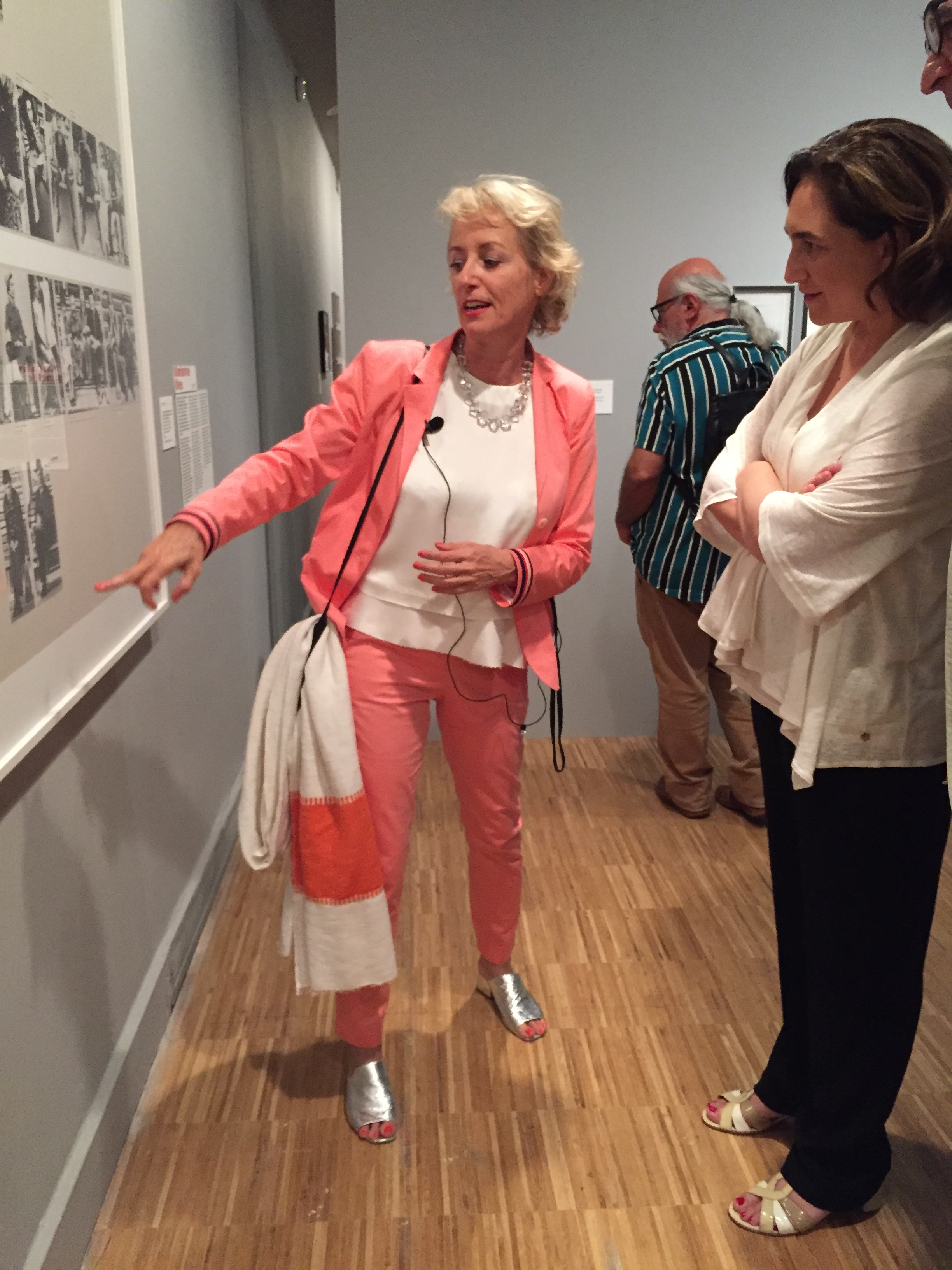 portrait